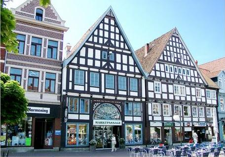 Markt Stadthagen